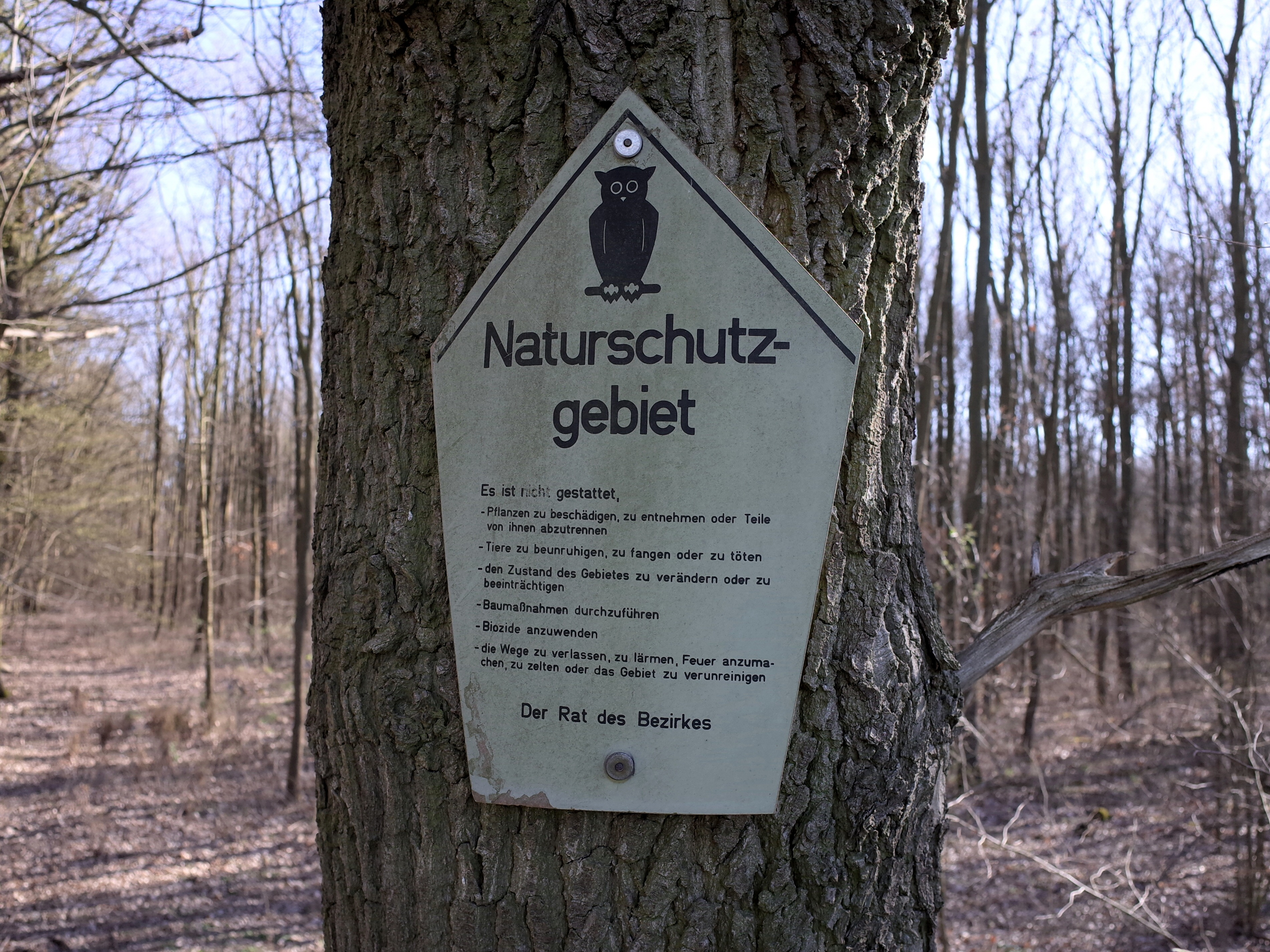 Schild zur Kennzeichnung von Naturschutzgebieten in der DDR.